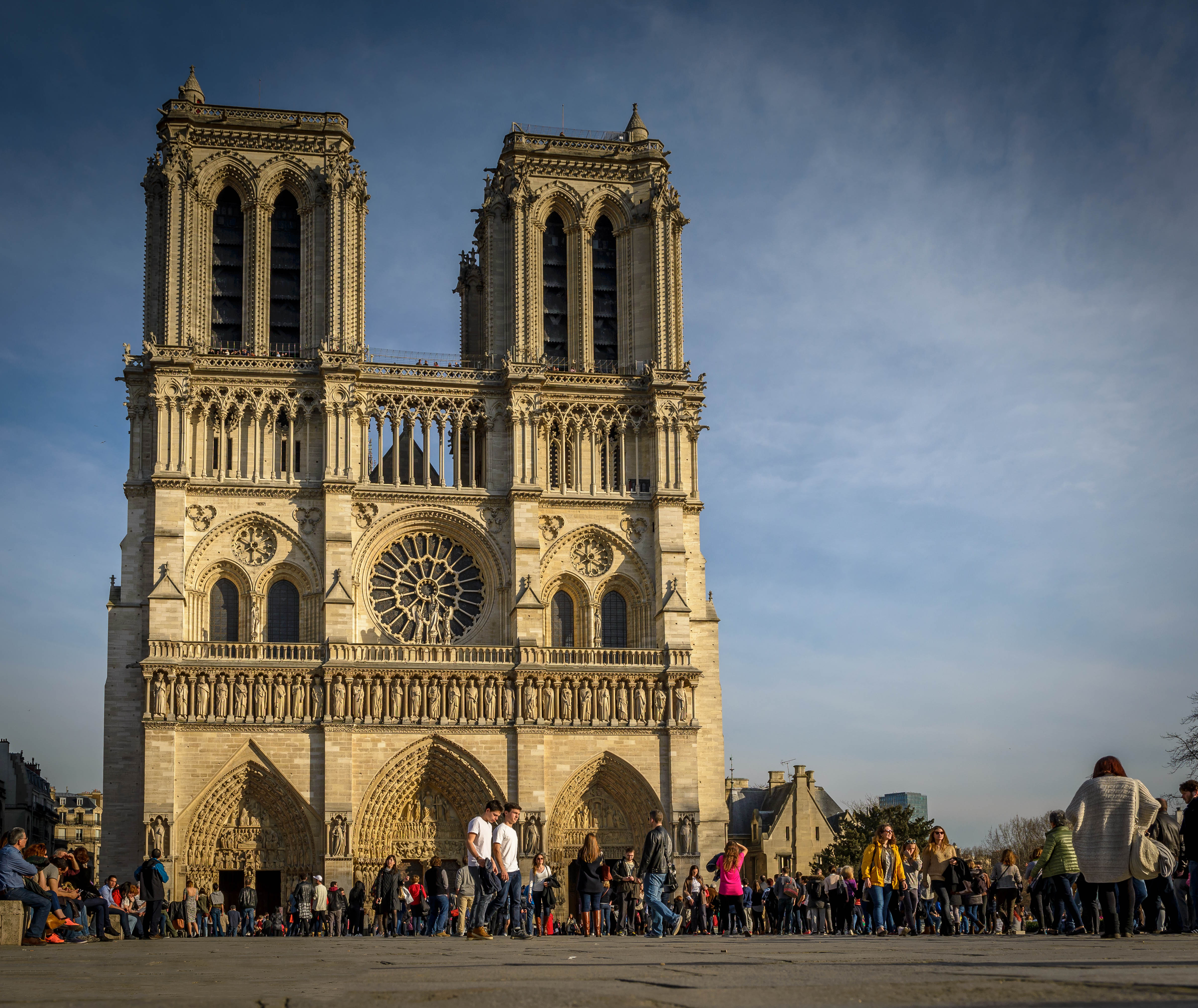 Notre Dame de Paris